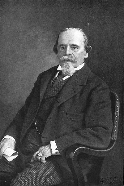 Retrato de Ignacio Mariscal, Secretario de Relaciones Exteriores de México. Publicado en "The Americana "; Editor-in-Chief Frederick Converse Beach, Managing Editor George Edwin Rines, Published by Scientific American Compiling Dep't, New York.